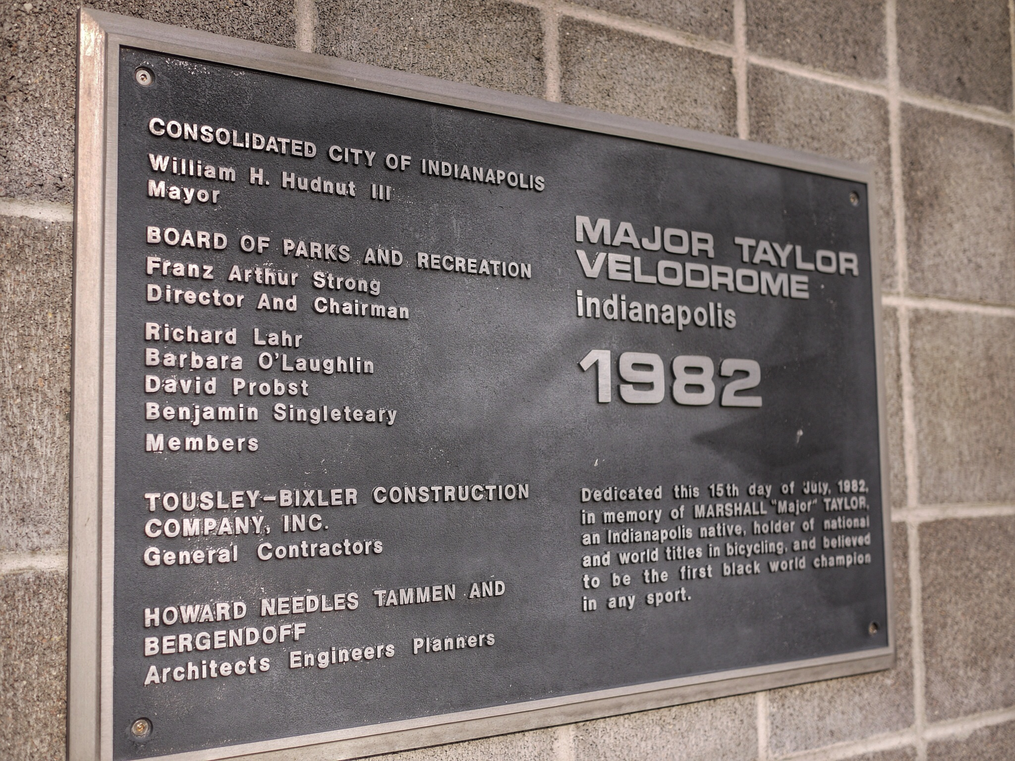 Major Taylor Velodrome